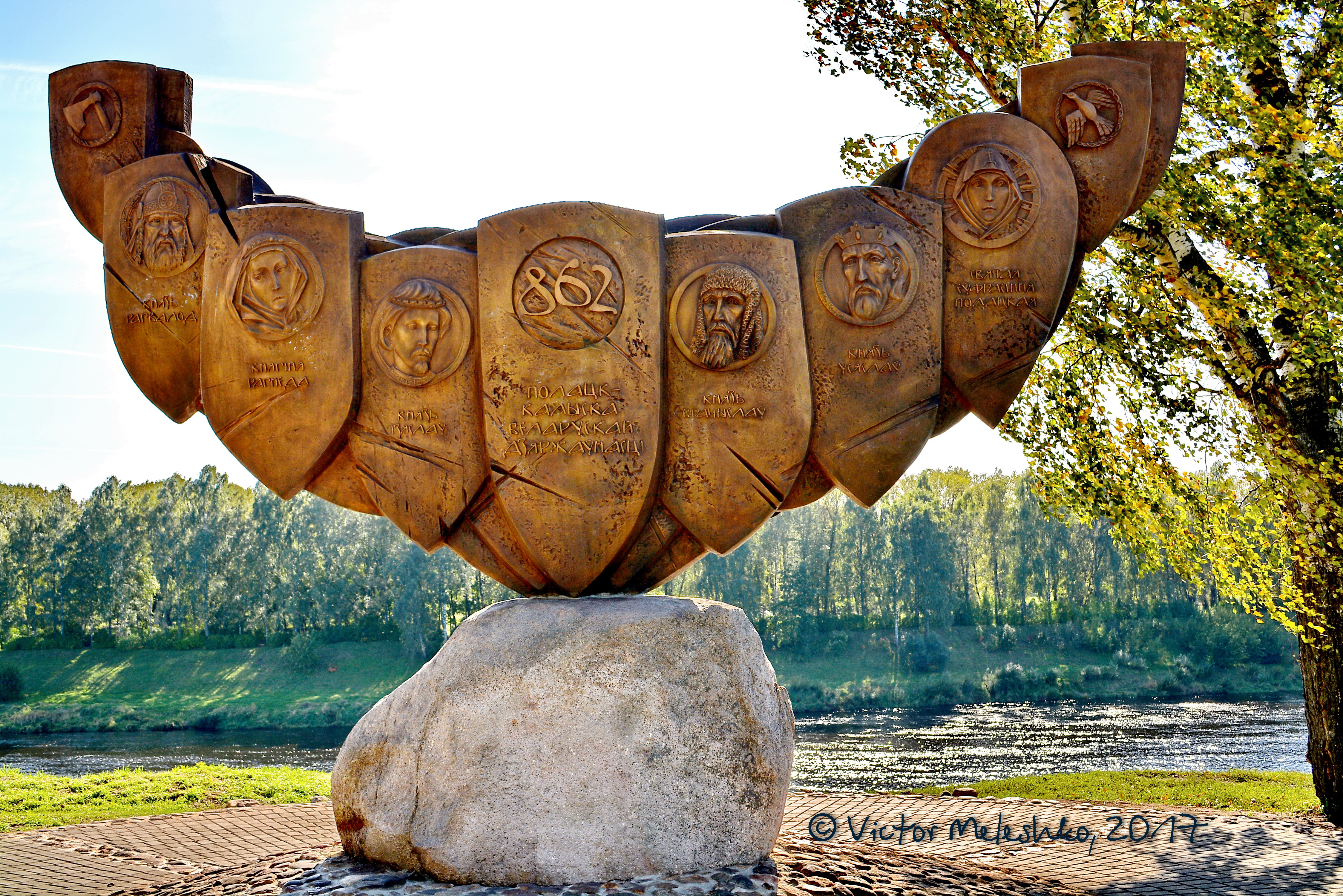 Полоцк, 2017 г.